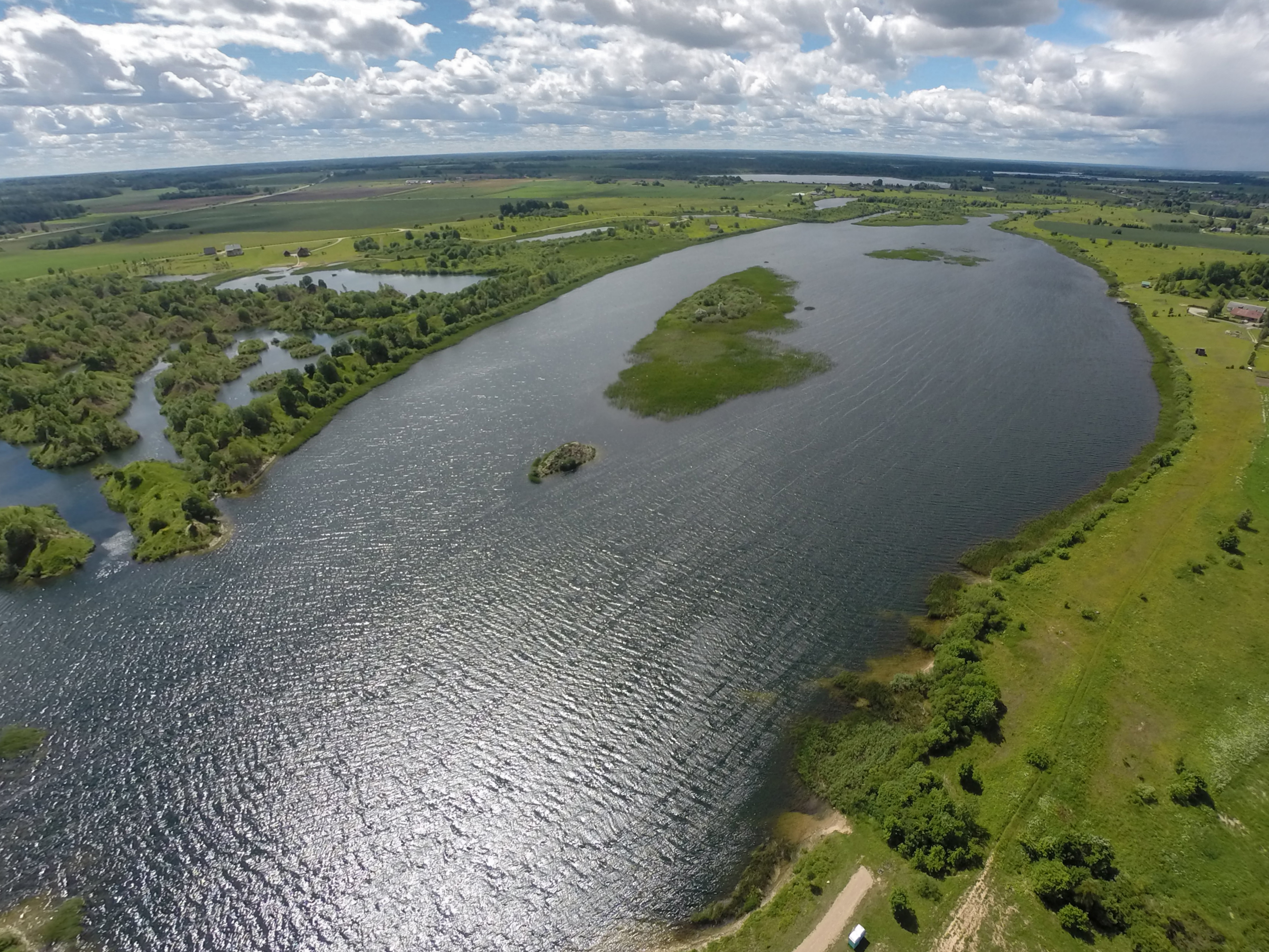 Sātiņu dīķi- aerial view